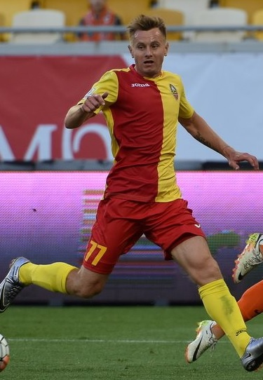 Алексей Чичиков - украинский футболист